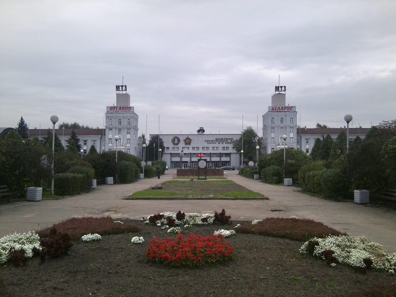 Минский тракторный завод